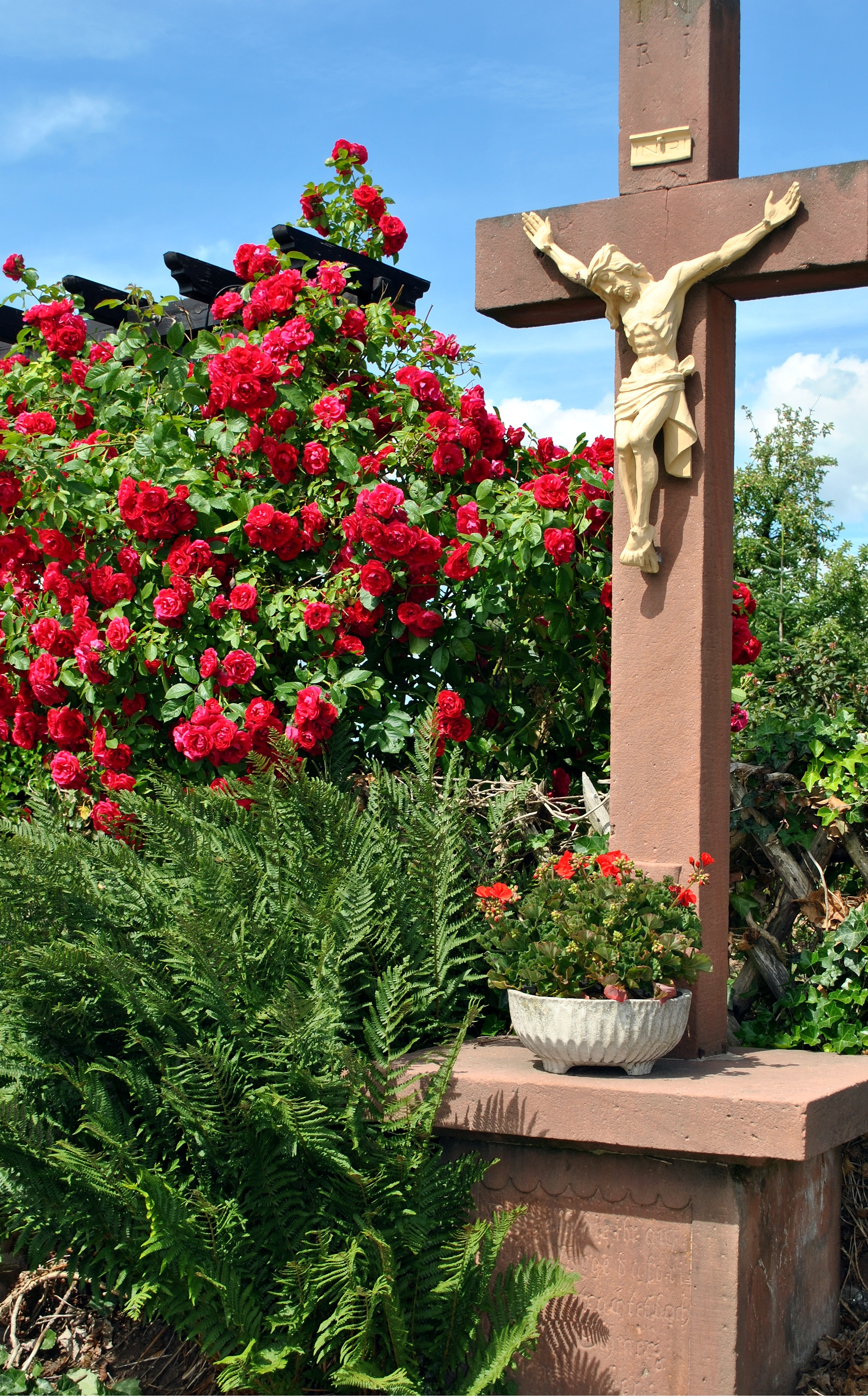 Modernes Steinkreuz vor dem Haus-Nr. 2 auf der Kailbacher Straße in Hesselbach